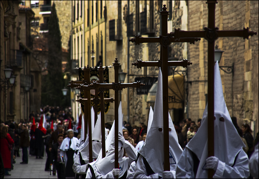 Nazarenos de la Hermandad del Via Crucis. Salamanca, España.